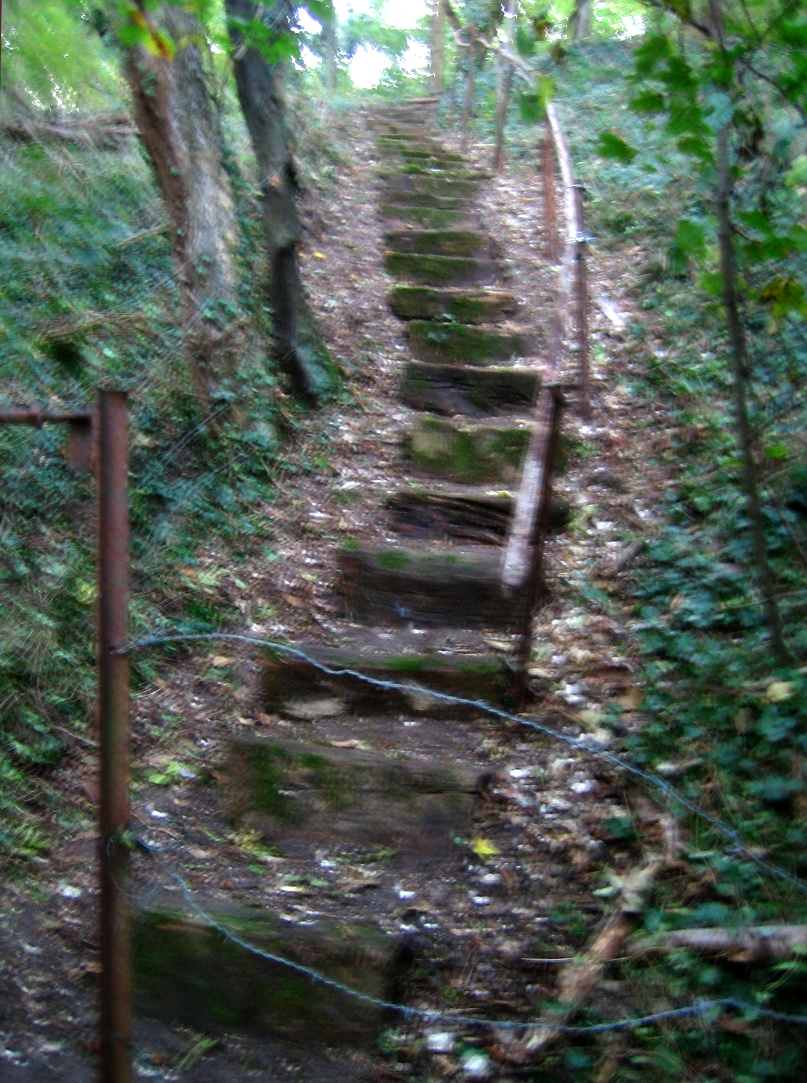 Liercourt (Somme, France) - L'oppidum présente des pentes escarpées. Un escalier d'une quinzaine de marches y est visible. (Cette photo est floue ... et devra bien entendu être refaite !)